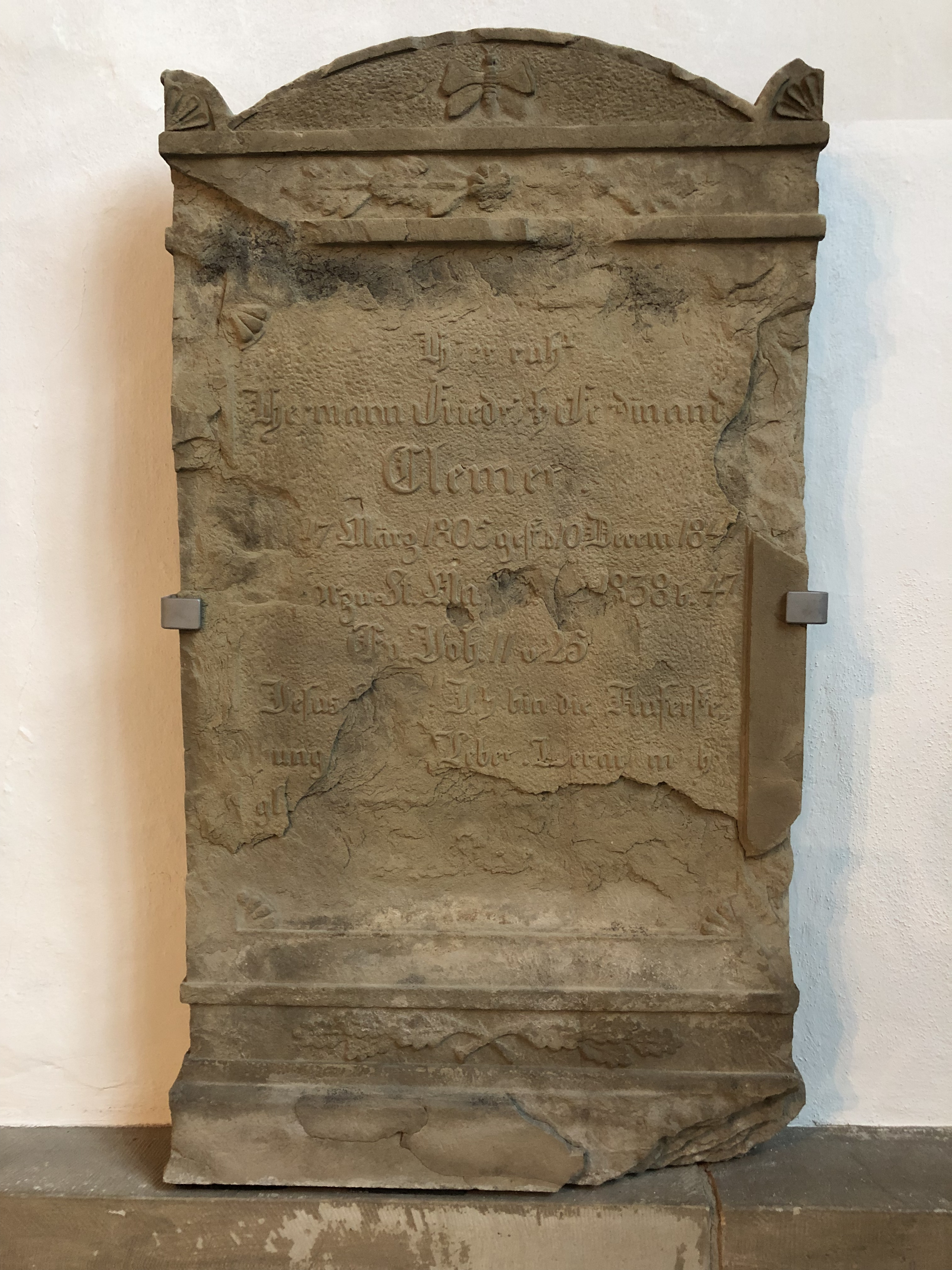 Der Grabstein von Pastor Ferdinand Clemen, der 1845 den Kindergarten Rampendal und den „Jünglingsverein“, den Vorläufer des heutigen CVJM gründete.